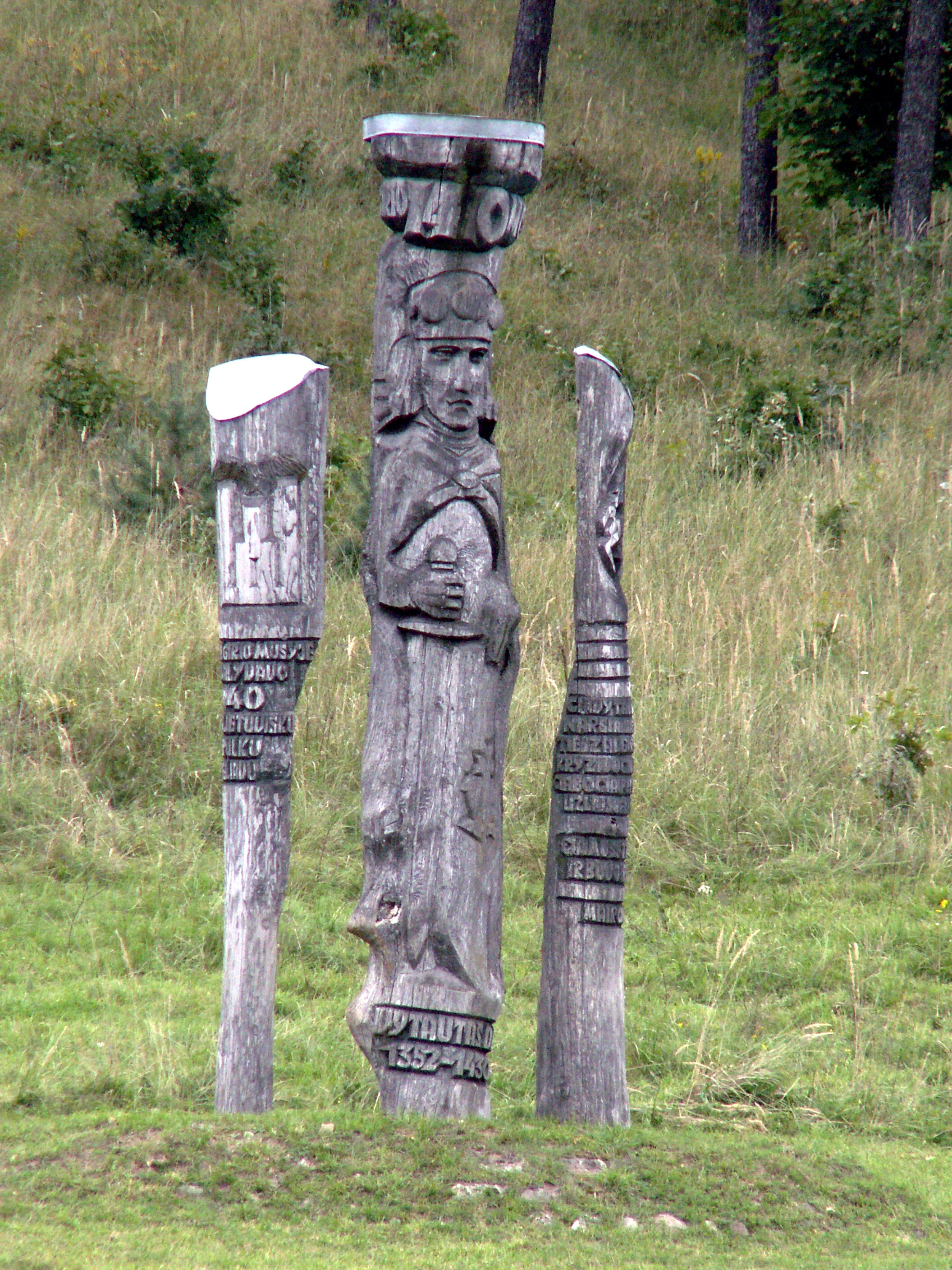 Kaltinėnų piliakalnis, paminklas Vytautui Didžiajam, Šilalės rajonas, Lietuva